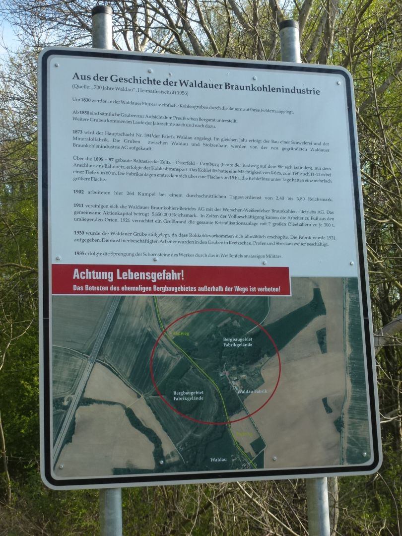 Informationstafel zur Braunkohlenindustrei in Waldau